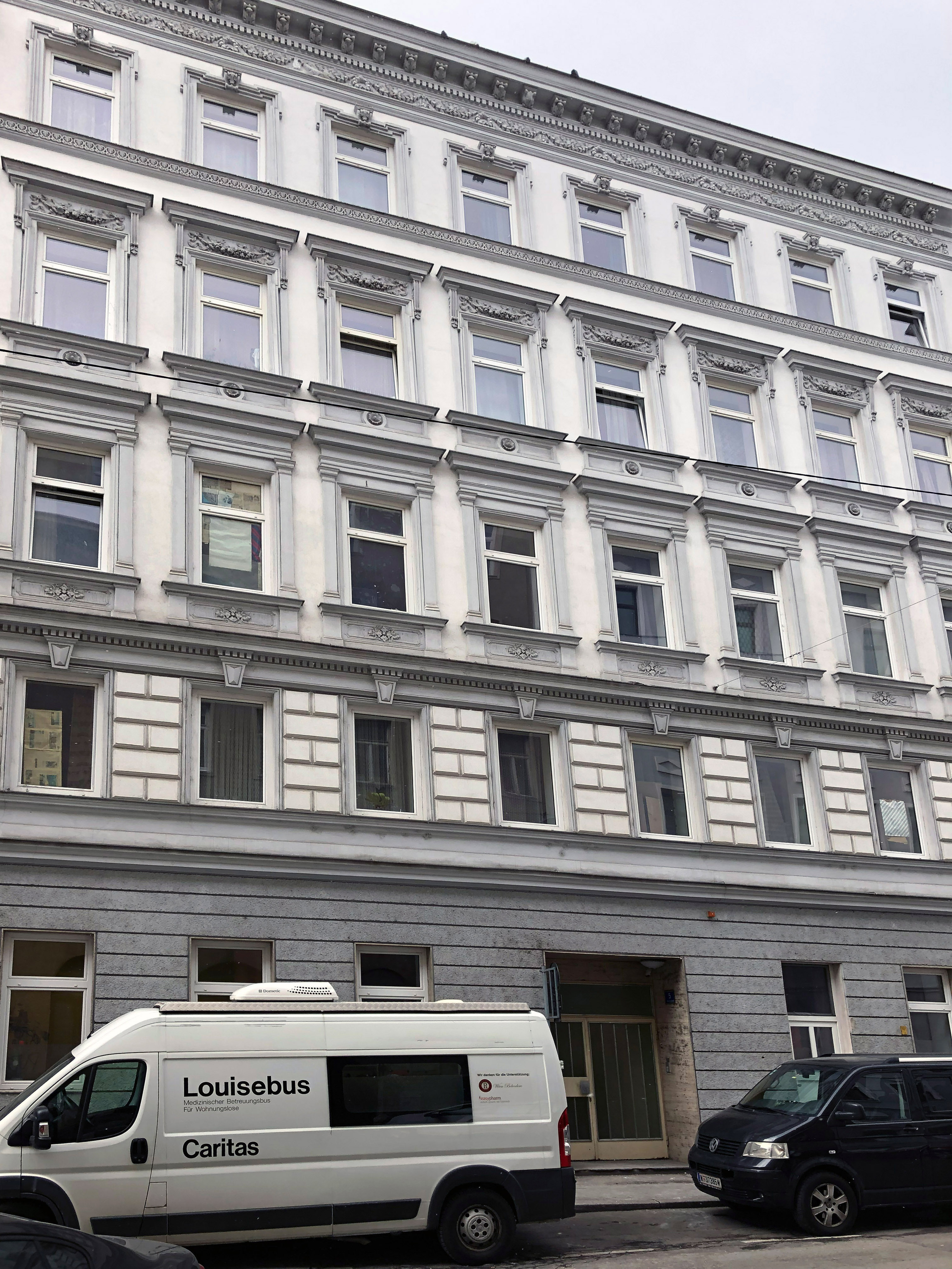 1020 Wien, Springergasse 5